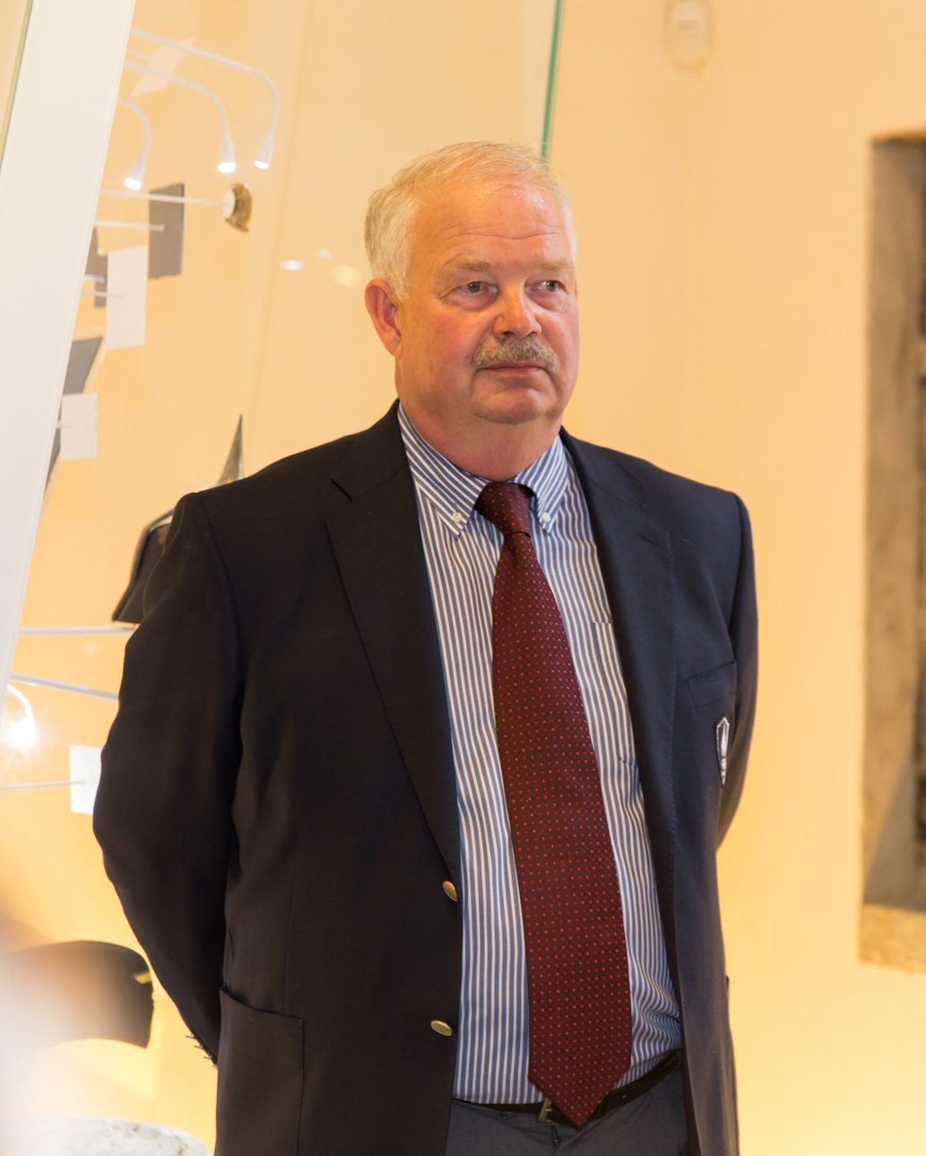 Jüri Tamm, Eesti Olümpiakomitee asepresident